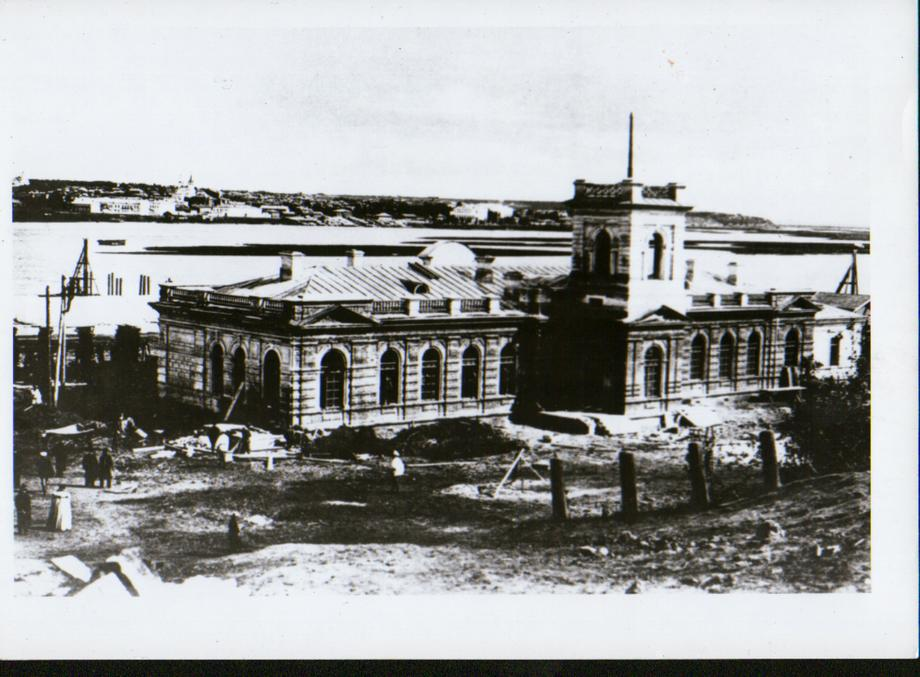 г. Иркутск. Железнодорожный вокзал, 1897-1898г. арх. В. Л. Мациевич.